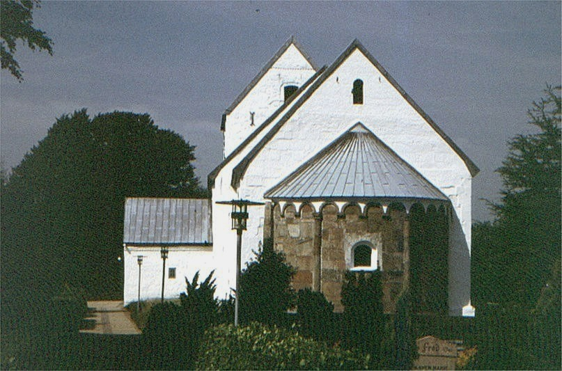 Kirken set fra øst Nørre Snede Kirke ligger i Nørre Snede Sogn, i Ikast-Brande Provsti (Århus Stift). Sognet ligger i Ikast-Brande Kommune (tidligere Nørre-Snede Kommune); indtil Kommunalreformen i 1970 lå det i Vrads Herred (Skanderborg Amt). Kirken var i middelalderen viet til Sankt Mikael. Apsis, kor og skib er opført i romansk tid af granitkvadre